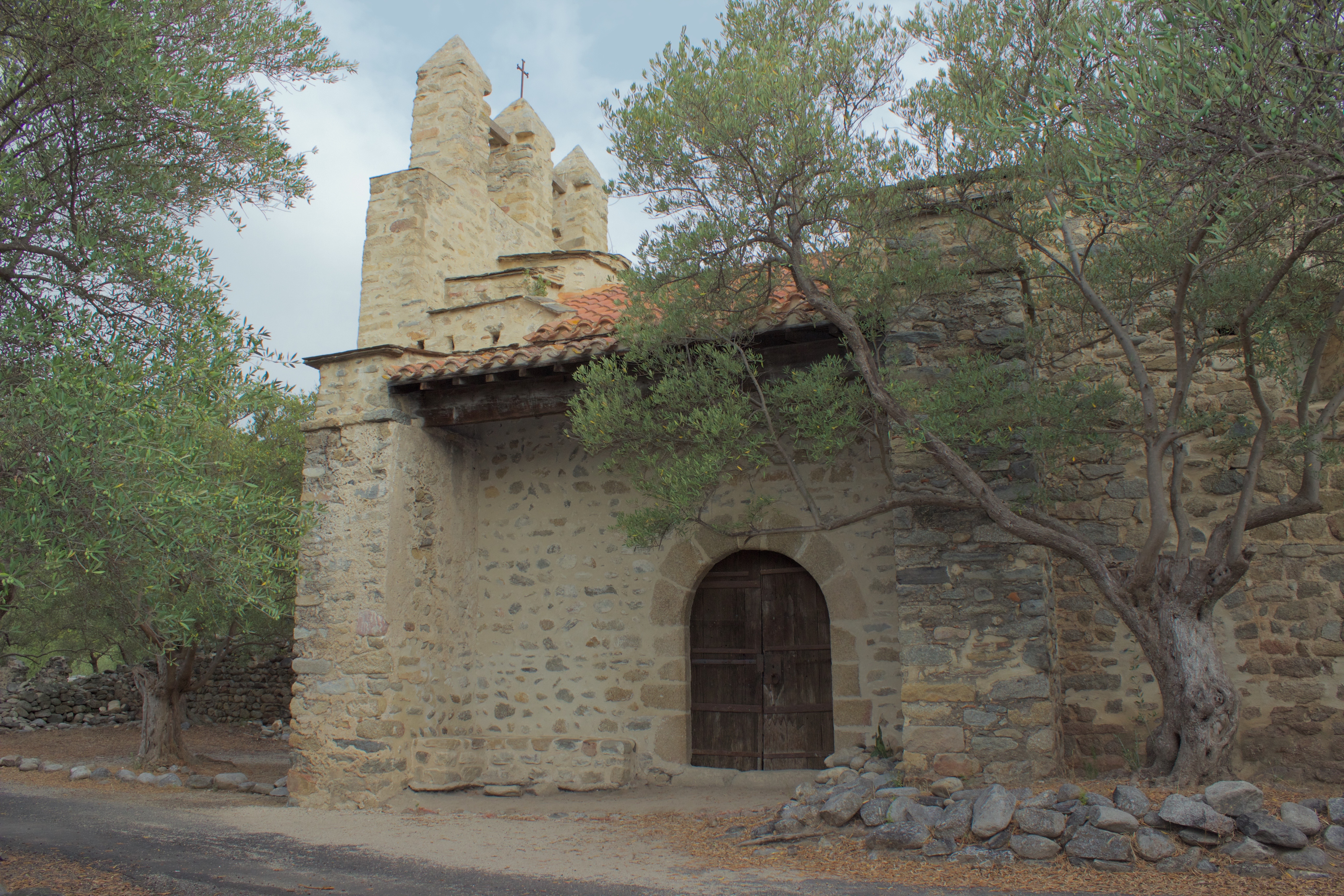 Face sue de l'église Saint-Sauveur de Casesnoves, Ille-sur-Têt